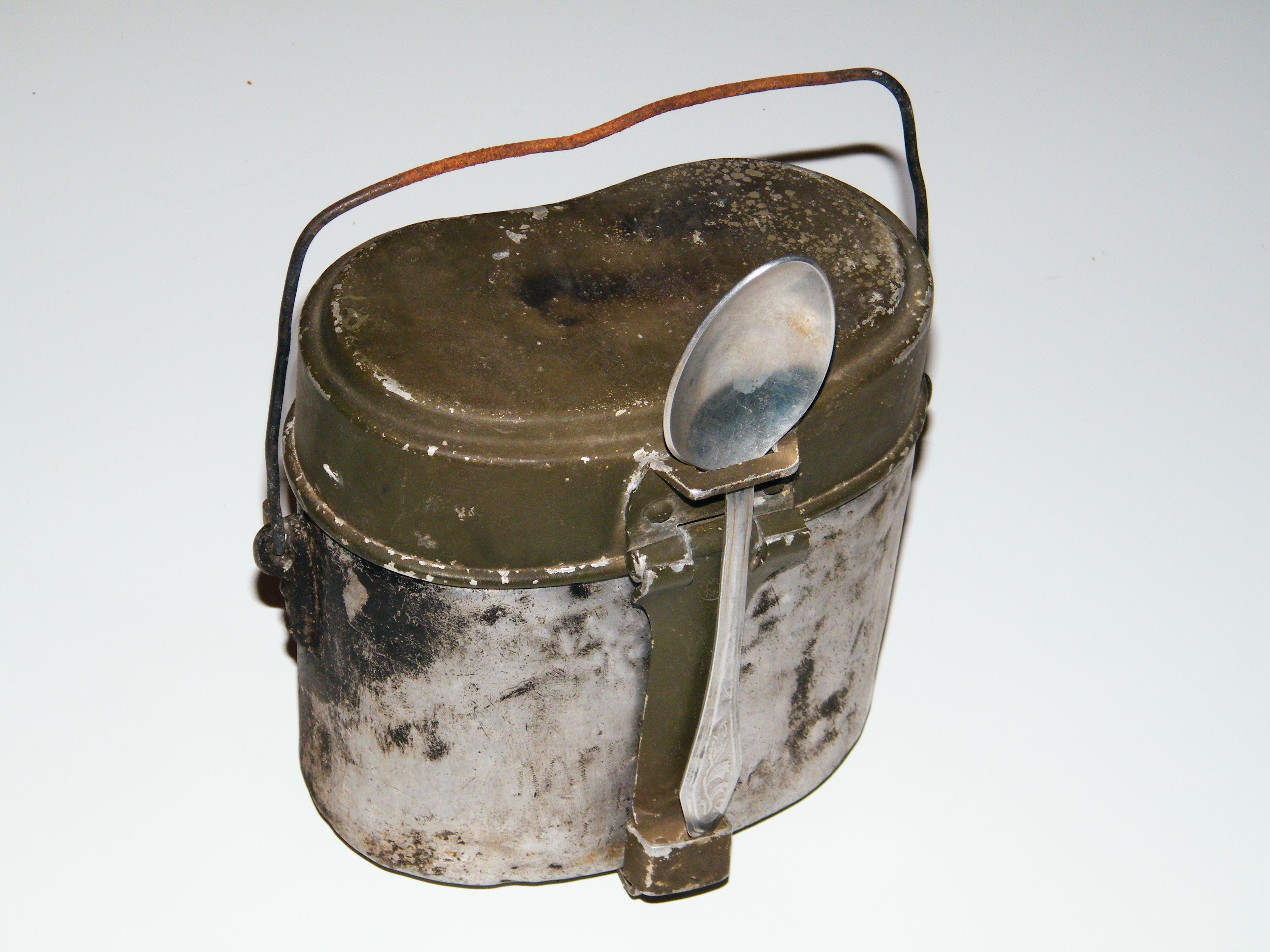 Котелок с ложкой